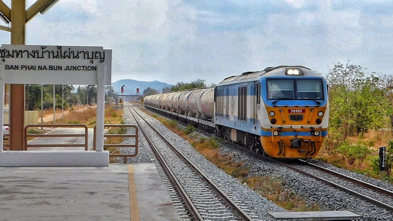 ภาพขณะรถปูนวิ่งผ่านสถานี